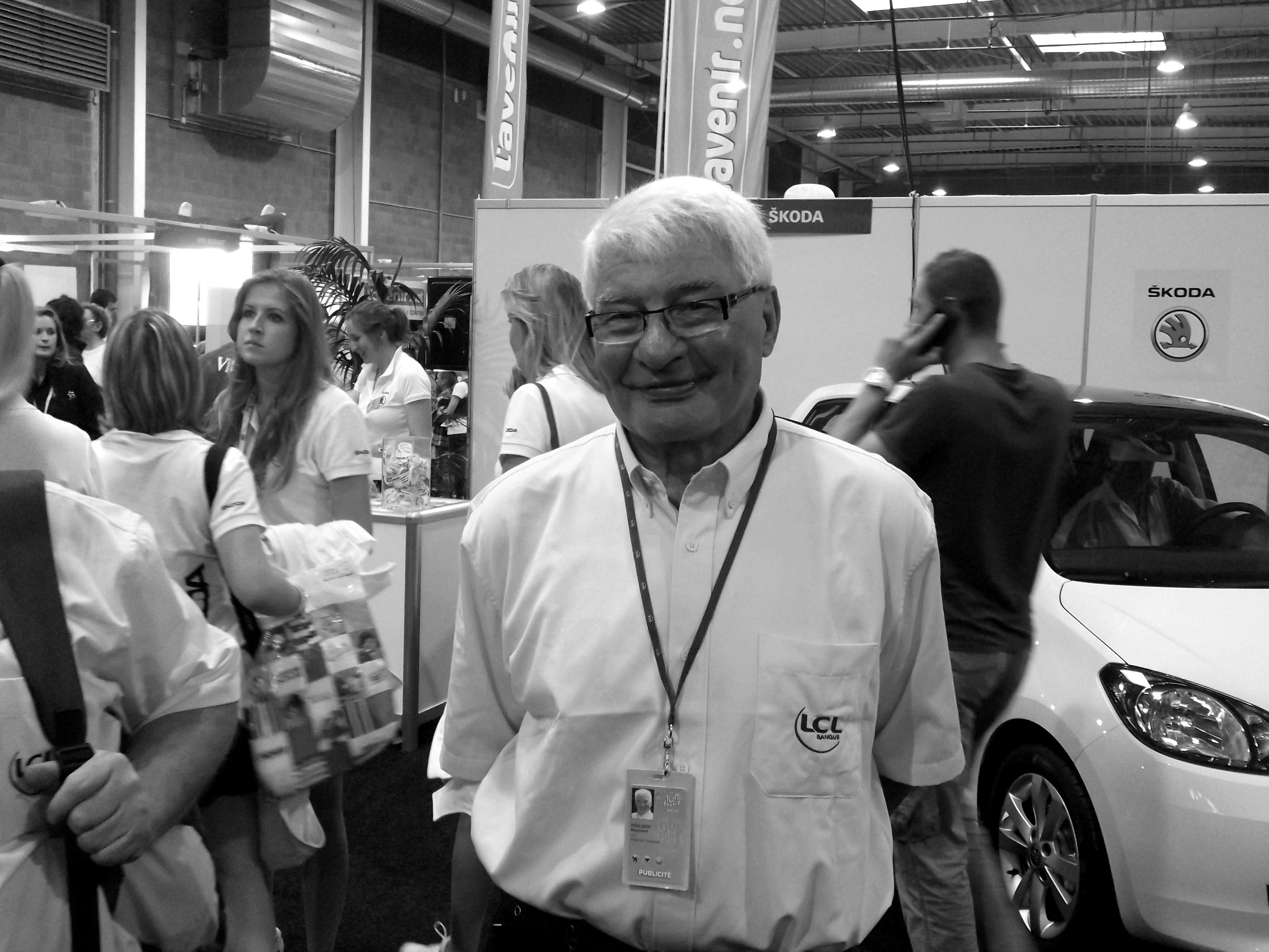 Raymond Poulidor aux Halles des Foires de Liège, en juin 2012, à l'occasion du départ du Tour de France